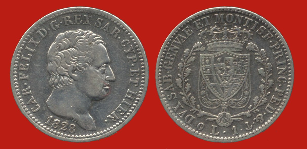 Regno di Sardegna - Carlo Felice di Savoia (1821 - 1831) Lira argento 900/1000 - grammi 5, millimetri 23, battuta 1828. Zecca di Genova. Testa nuda dx con iniziali autore A.L. (Amedeo Lavy). Intorno CAR•FELIX•D•G•REX•SAR•CYP•ET•HIER• scudo a cuore coronato e con collare dell'Annunziata, tra due rami di quercia. Intorno DVX SAB•GENVAE ET MONTISF• PRINC• PED•&. In basso i marchi di zecca: P in ovale ed ancoretta (Genova). Sotto L. 1 Bordo in incuso FERT tra nodi savoia e rosette. Quell'anno alla zecca di Genova furono battuti 387.823 pezzi da una lira.